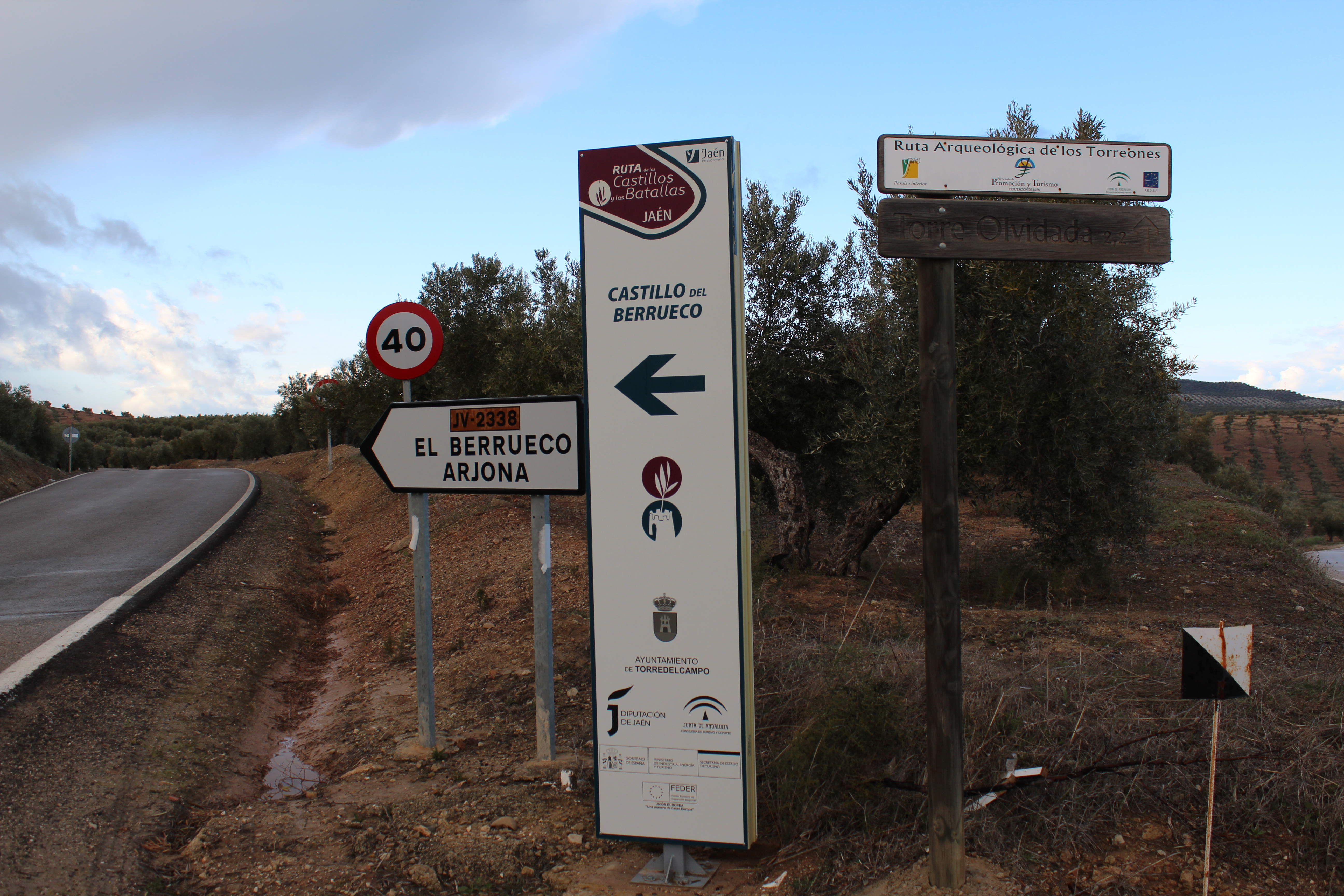 Carteles de la Ruta de los Castillos y las Batallas de Jaén, así como de la Ruta arqueológica de los Torreones, en un cruce de caminos, en la carretera de Garcíez hacia Torredelcampo y hacia la aldea del Berrueco.